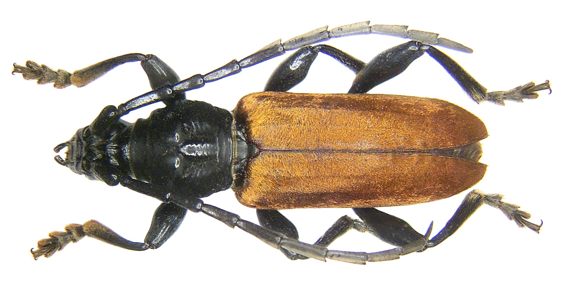 Familie: Cerambycidae Grösse: 19 mm Fundort: Indonesien, Halmahera, Dolik leg. A.Skale, 2006; det. A.Weigel Foto: U.Schmidt, 2007